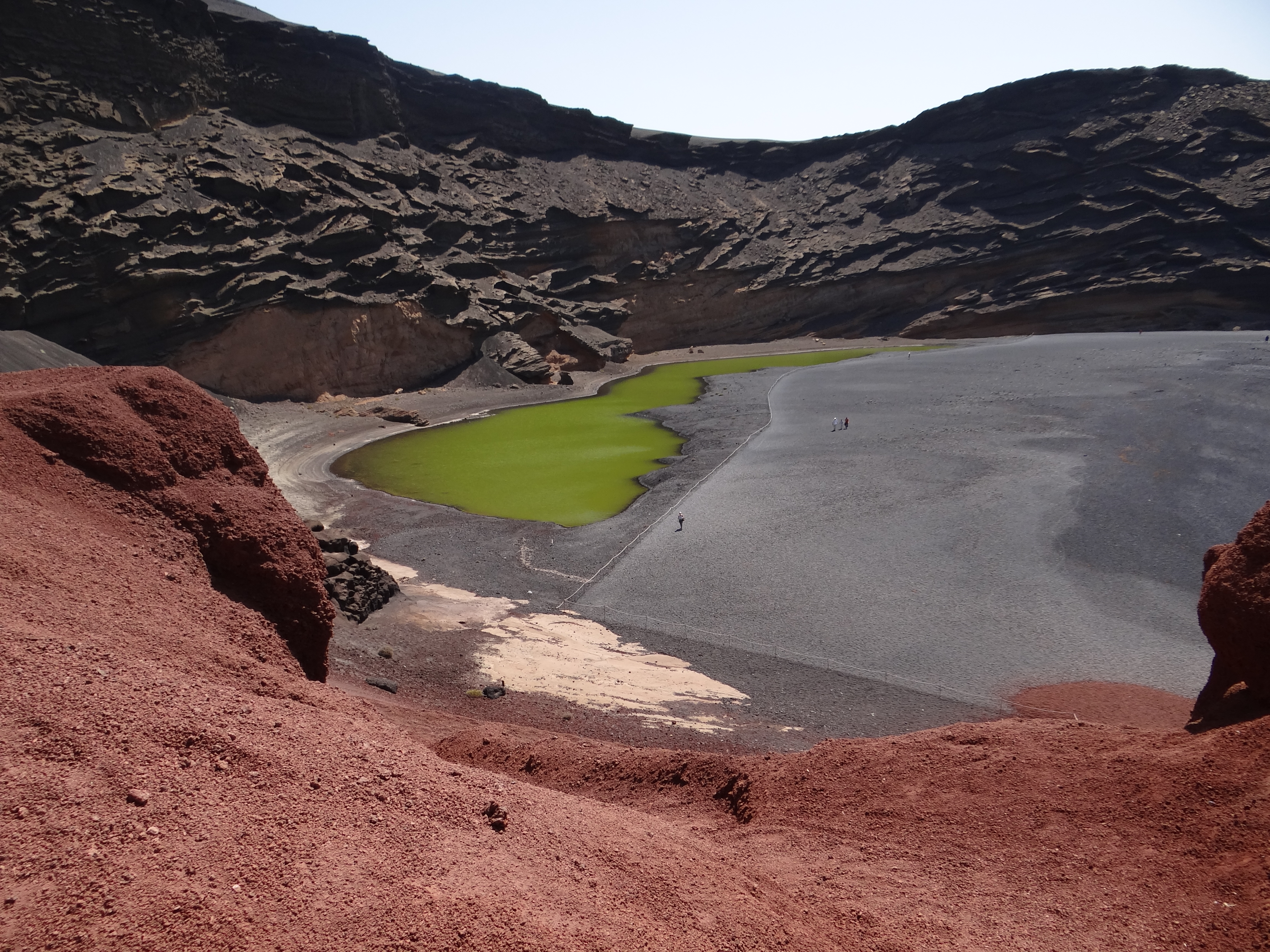 lagon vert el golfo